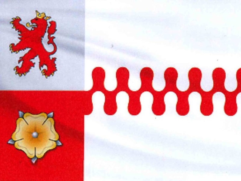 Berg en Dal gemeentevlag